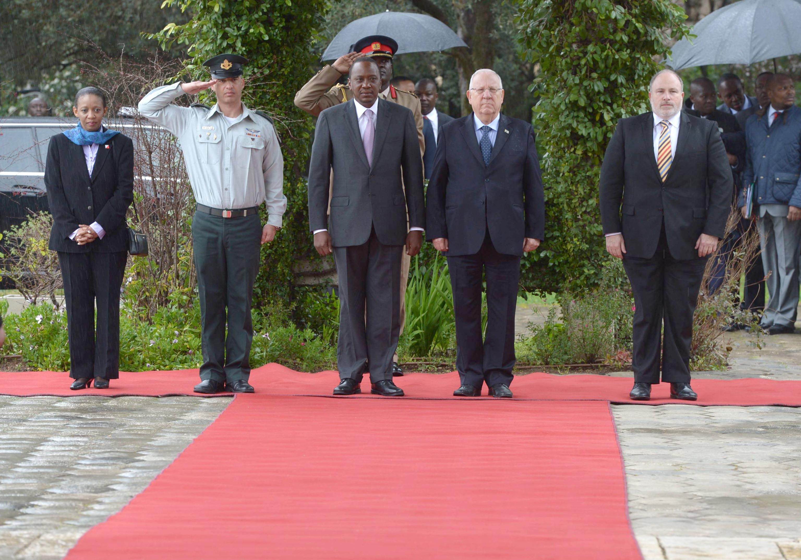 נשיא הרפובליקה של קניה אהורו קניאטה בביקור בישראל עם ראובן ריבלין נשיא מדינת ישראל